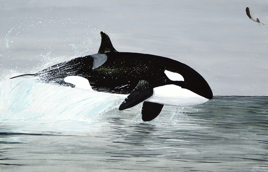 Drawing of an orca. Zeichnung eines Orcas.